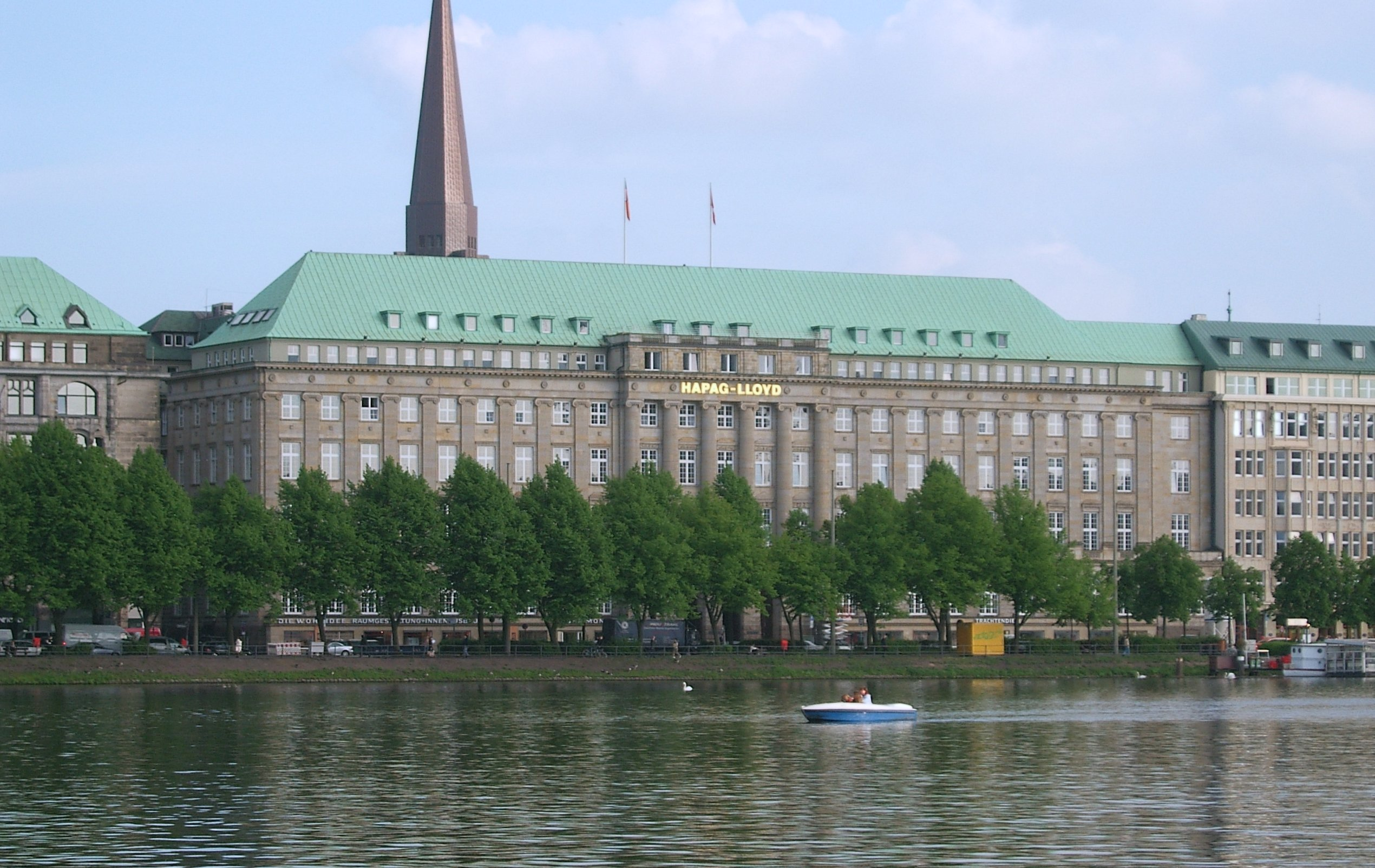 Hamburg Innenstadt, Verwaltung der Hamburg-Amerikanische Packetfahrt-Actien-Gesellschaft (HAPAG)